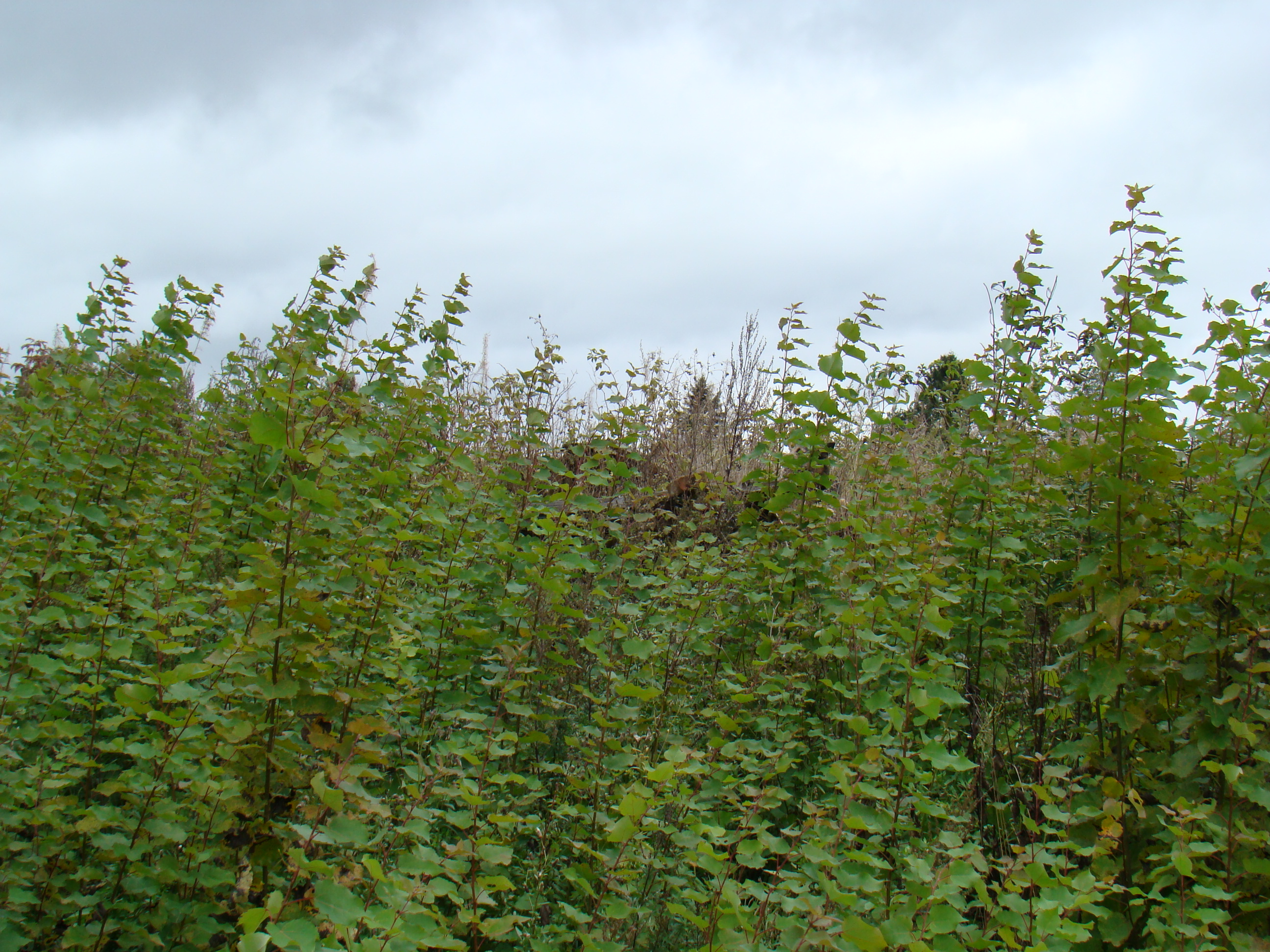 Дом жилой (дом, в котором в 1802 г. родился архитектор А.И. Штакеншнейдер): мыза Ивановка, Гатчинский район, Ленинградская область